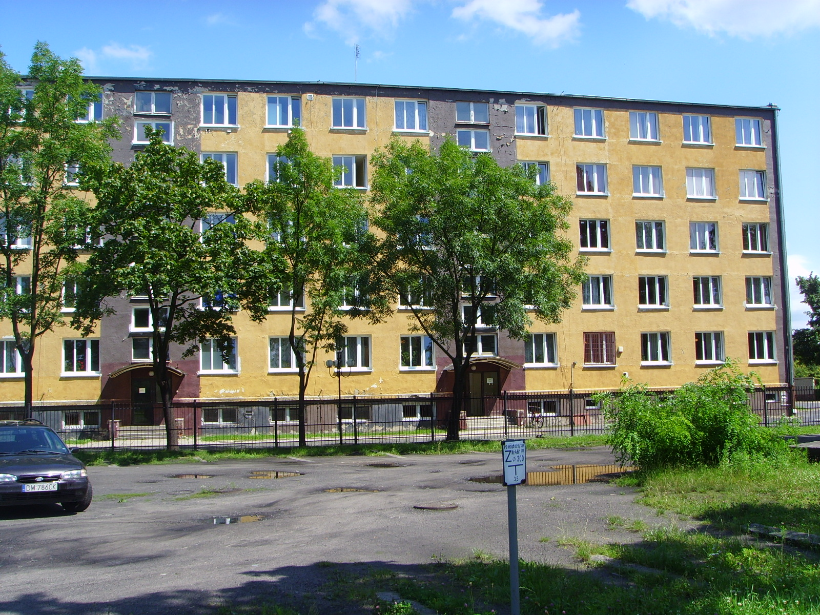 WSO we Wrocławiu